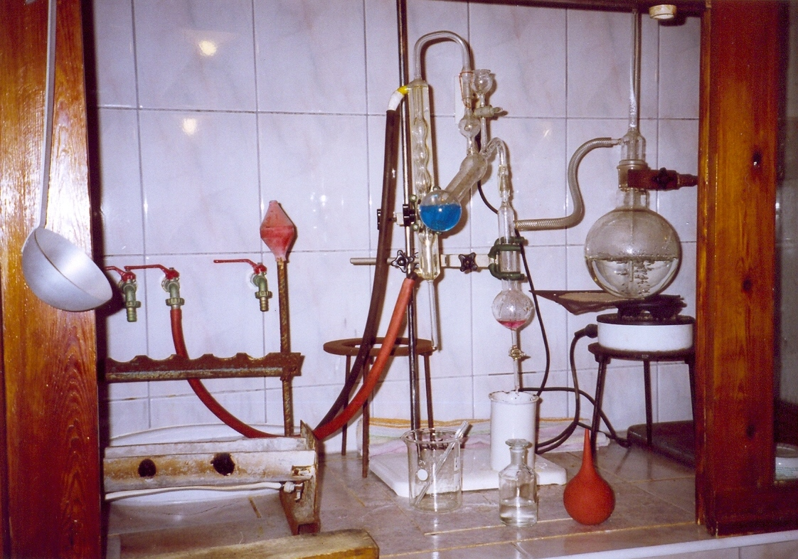 Parnas-Wagner apparatus (for Kjeldahl distillation)